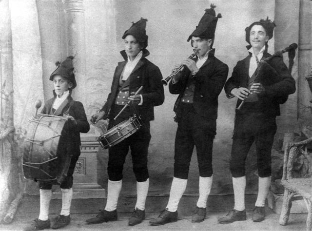 Os Trintas de Trives